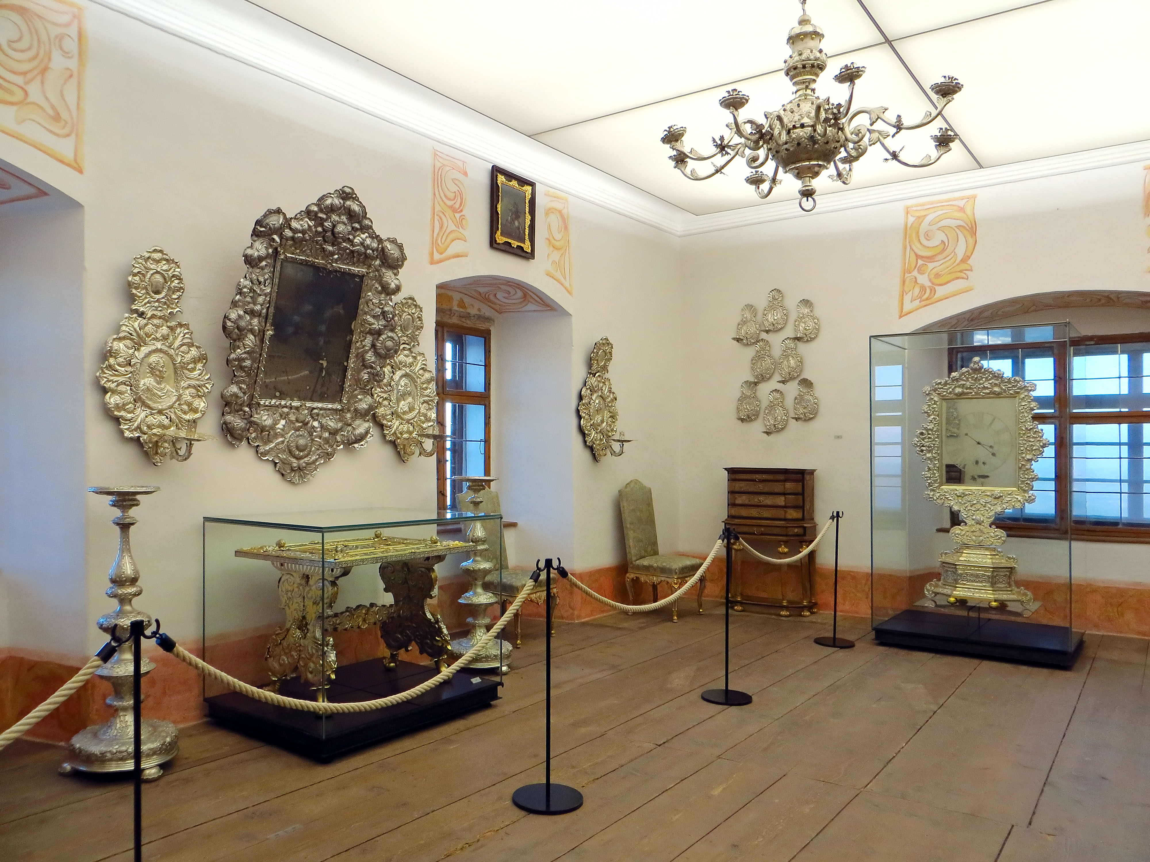 Burg Forchtenstein